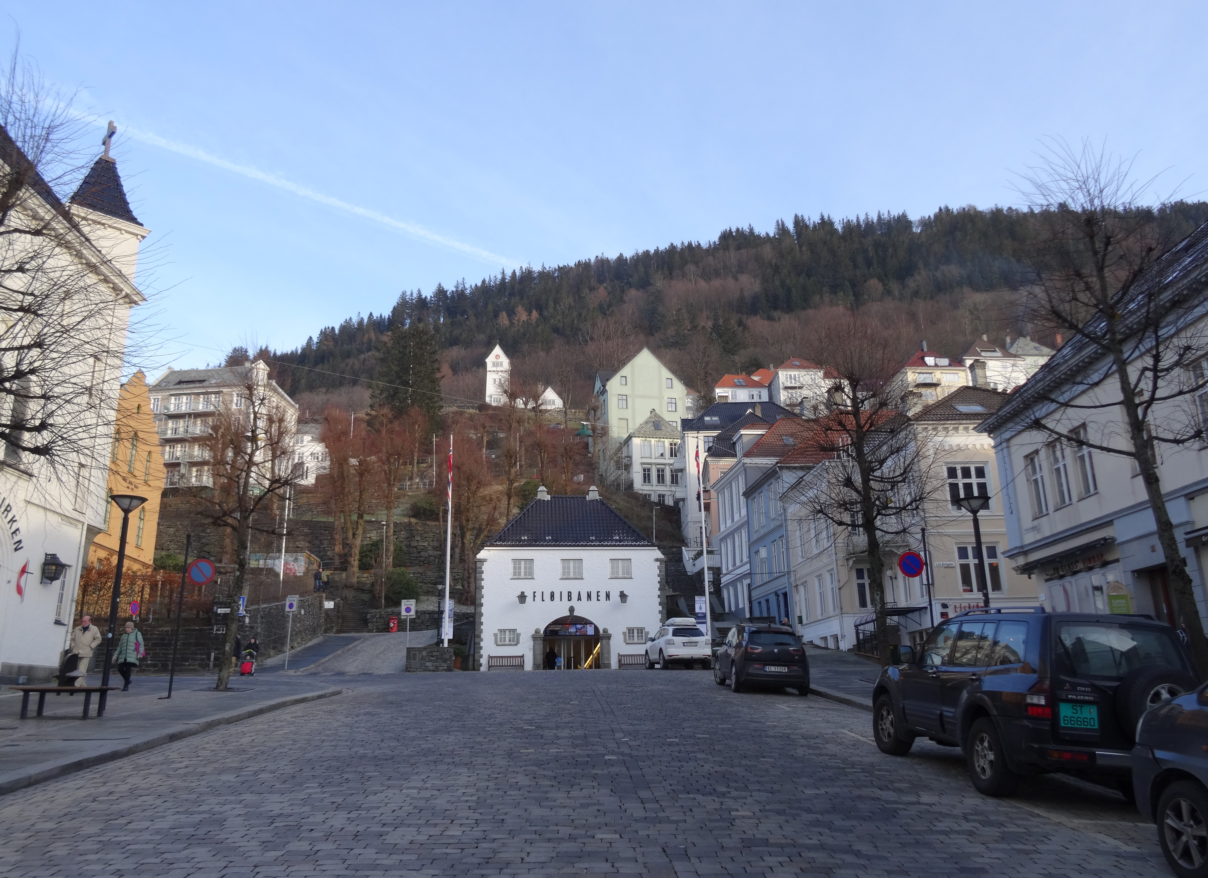 Fløibanen Bergen